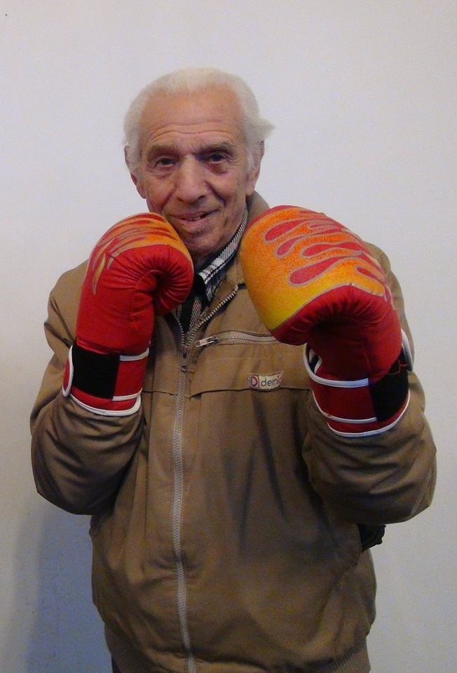 Георги Георгиев - бат Найчо в бойна стойка